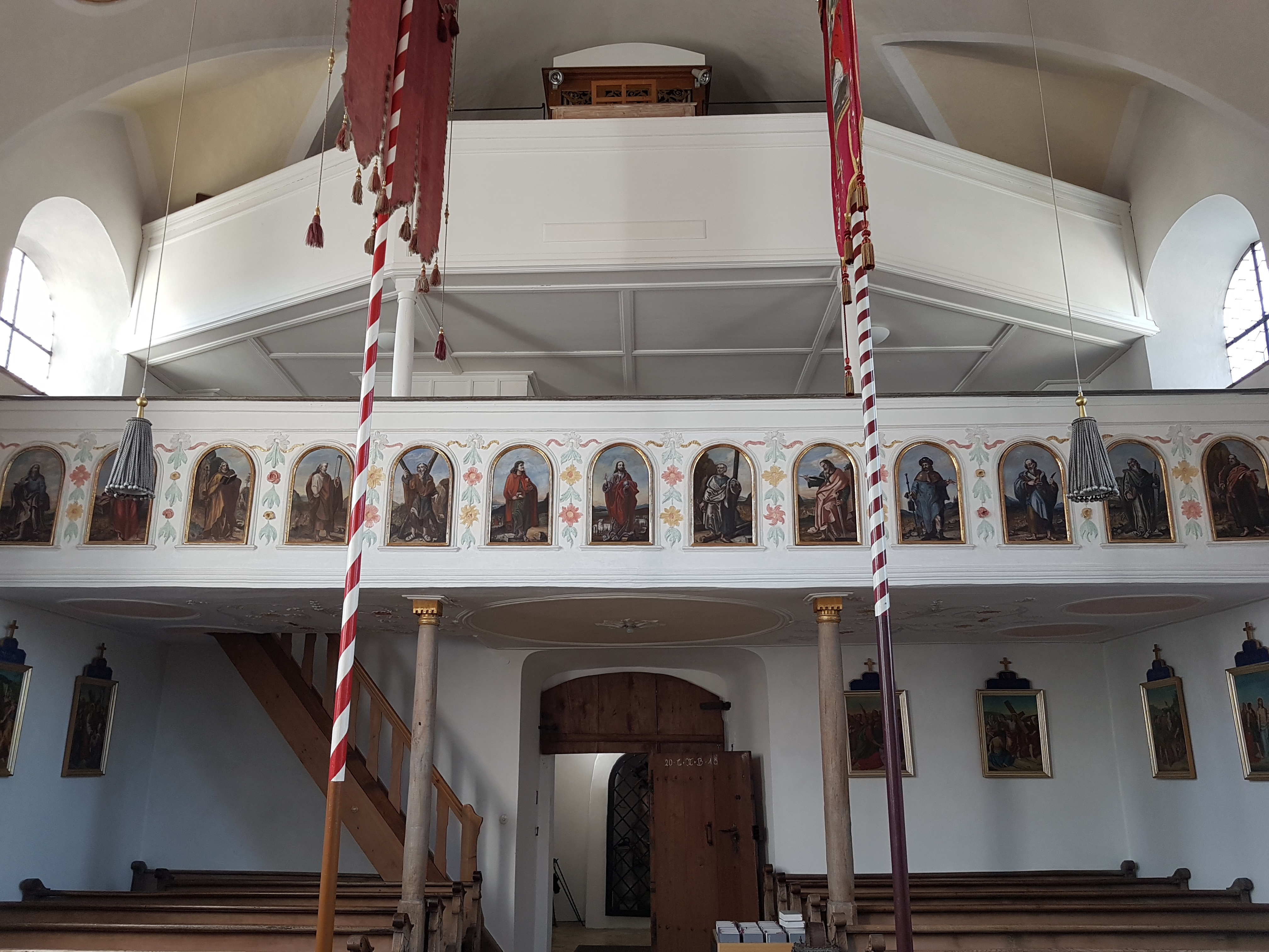 Riegsee, St. Stephan